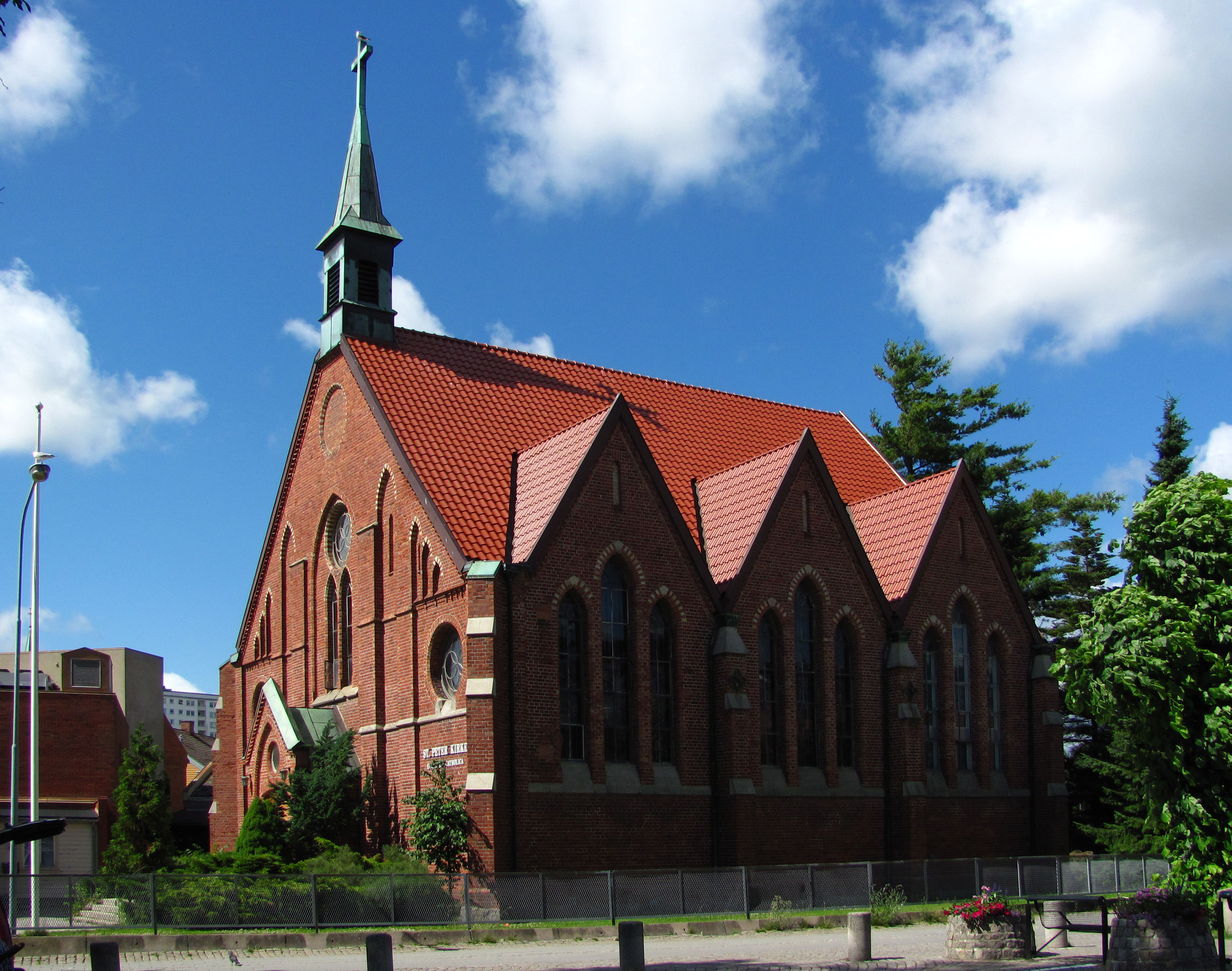 St. Peter katolske kirke i Halden, Østfold.